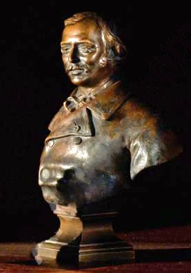 Buste de Victor Thiébaut, d'après Jean-Baptiste Carpeaux.